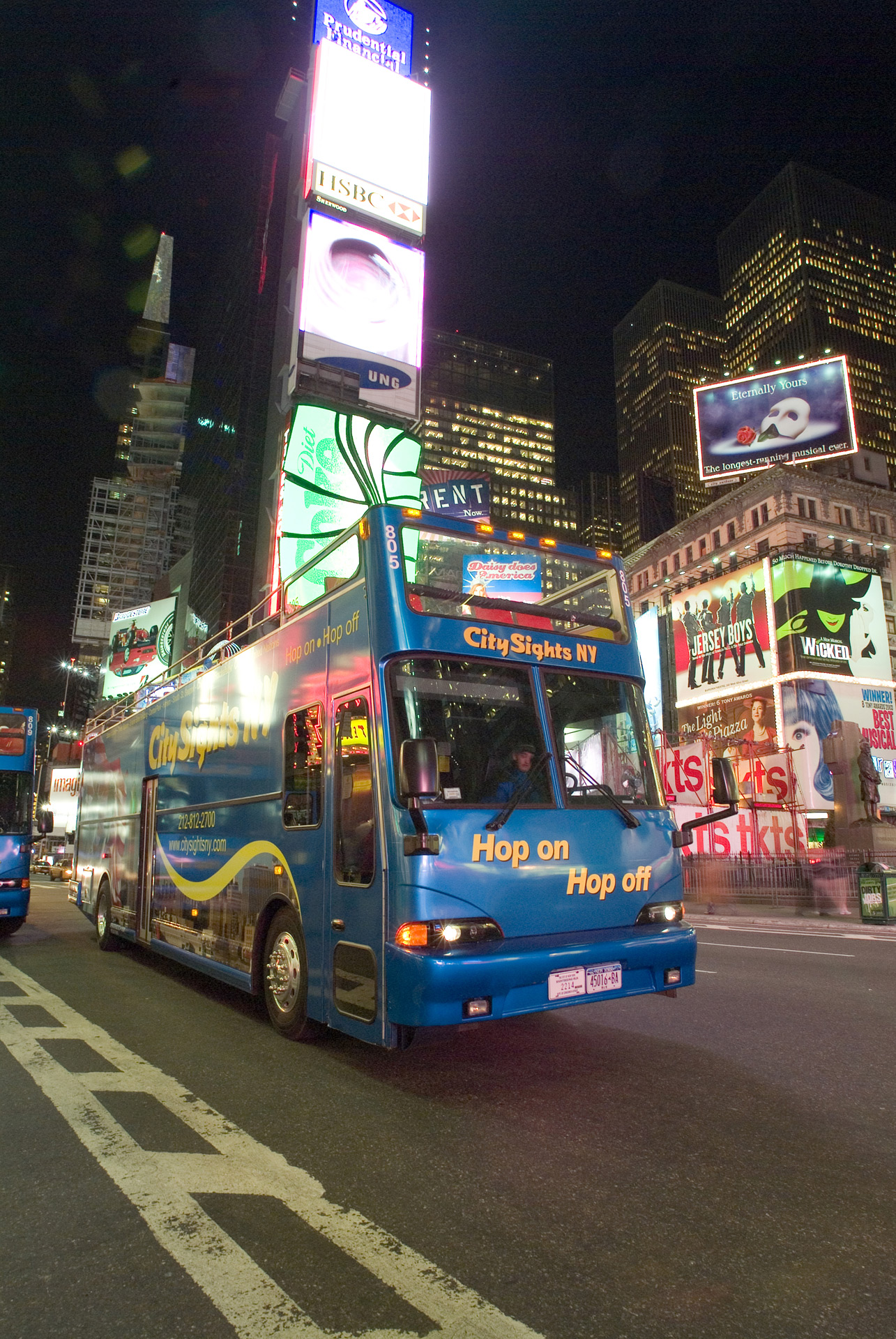 جانب من مدينة نيويورك في الحافلة السياحية